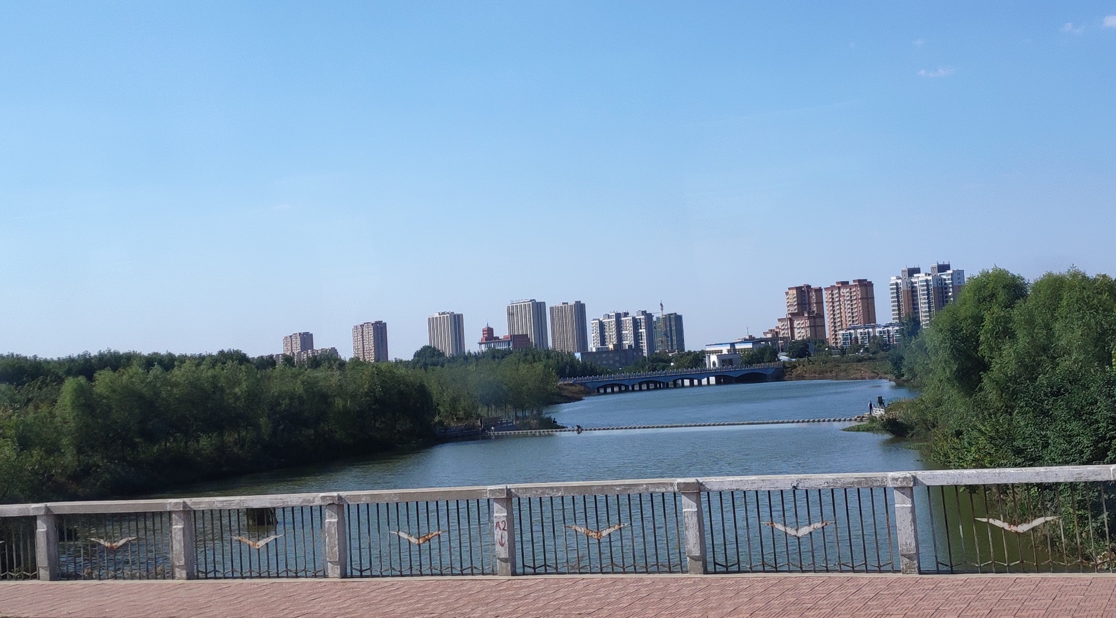 中文（中国大陆）: 平阴县城的一条河流